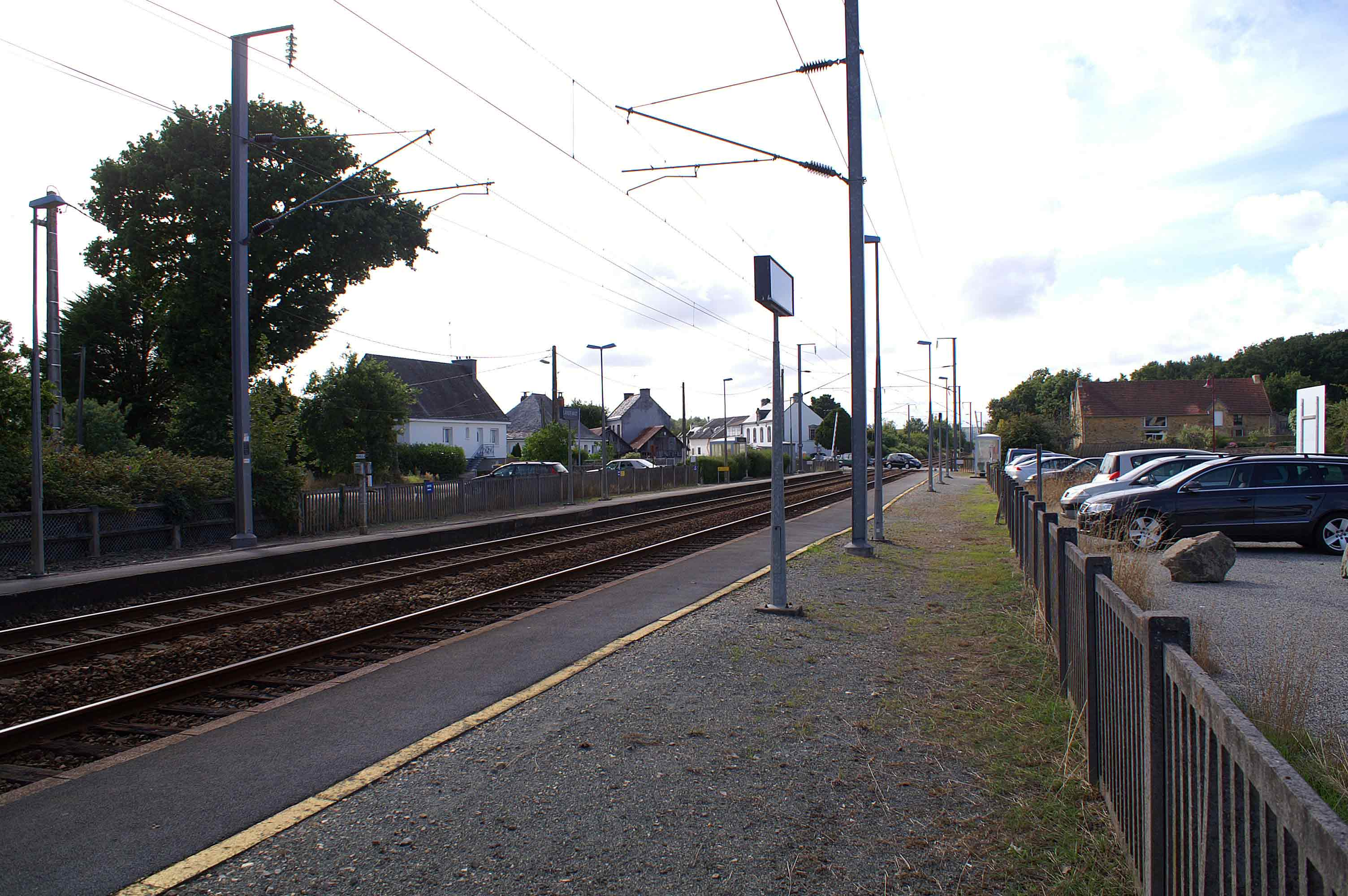 La gare de Landévant, aujourd'hui halte à accès libre, qui accueil les Ter Bretagne de la ligne 12 Lorient-Vannes. On apperçoit les deux abris voyageurs et au fond, en direction de Lorient, le passage à niveau permettant le passage d'un quai à l'autre.